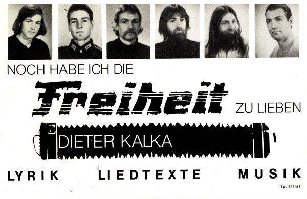 Werbekarte des Programmes: Noch habe ich die Freiheit zu lieben